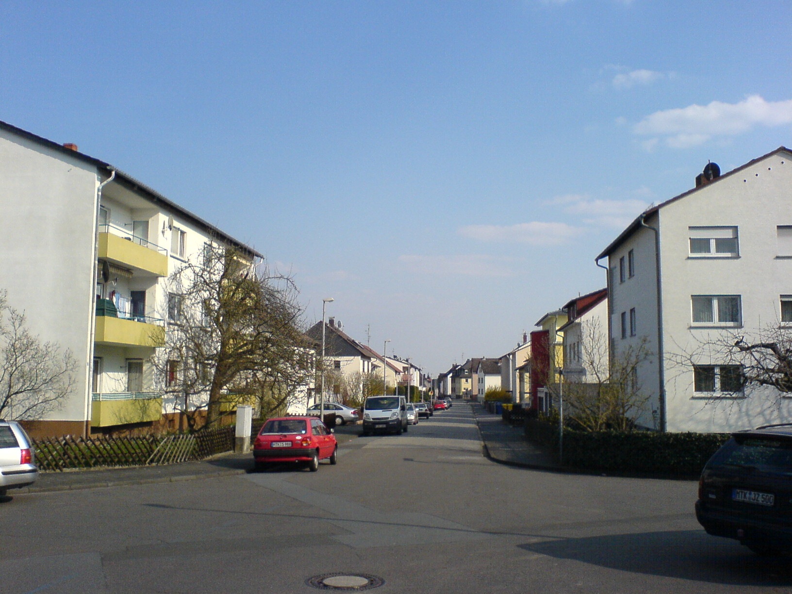 en.: Hattersheimer Straße at Kelkheim-Münster, Germany; dt.: Hattersheimer Straße in Kelkheim-Münster